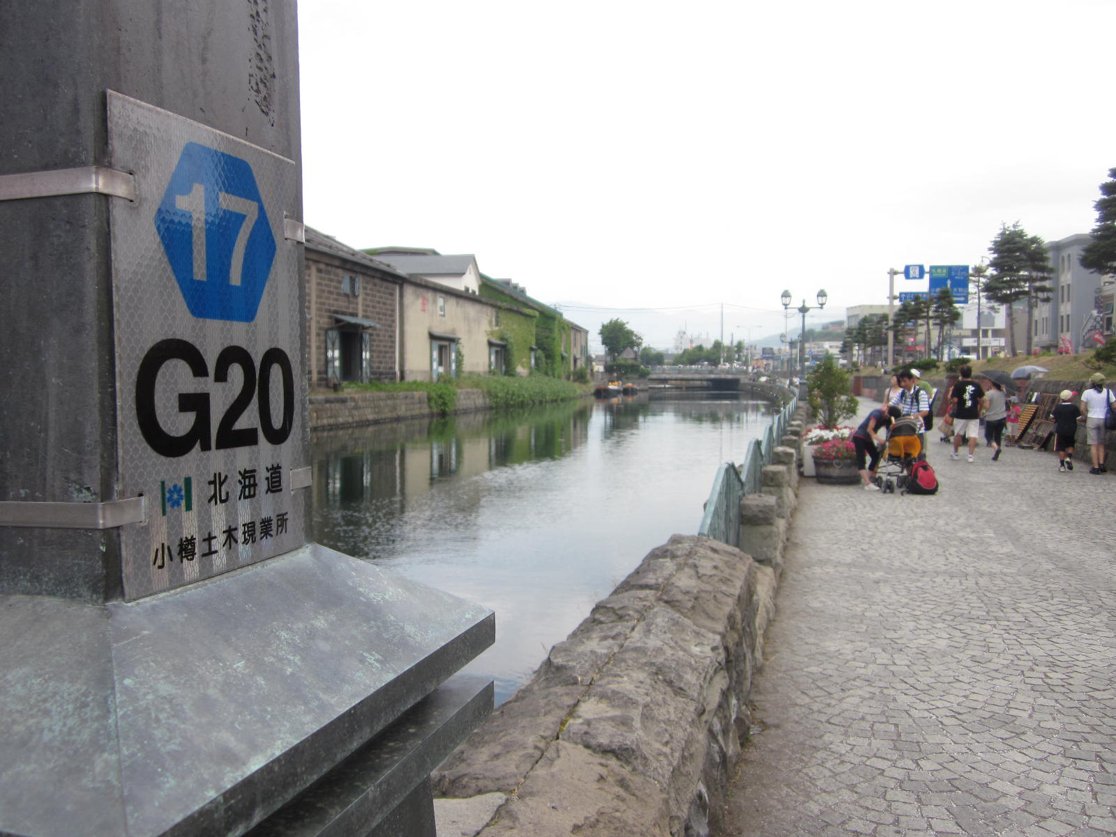 北海道道17号小樽港線 小樽運河埋立による歩道拡張部分